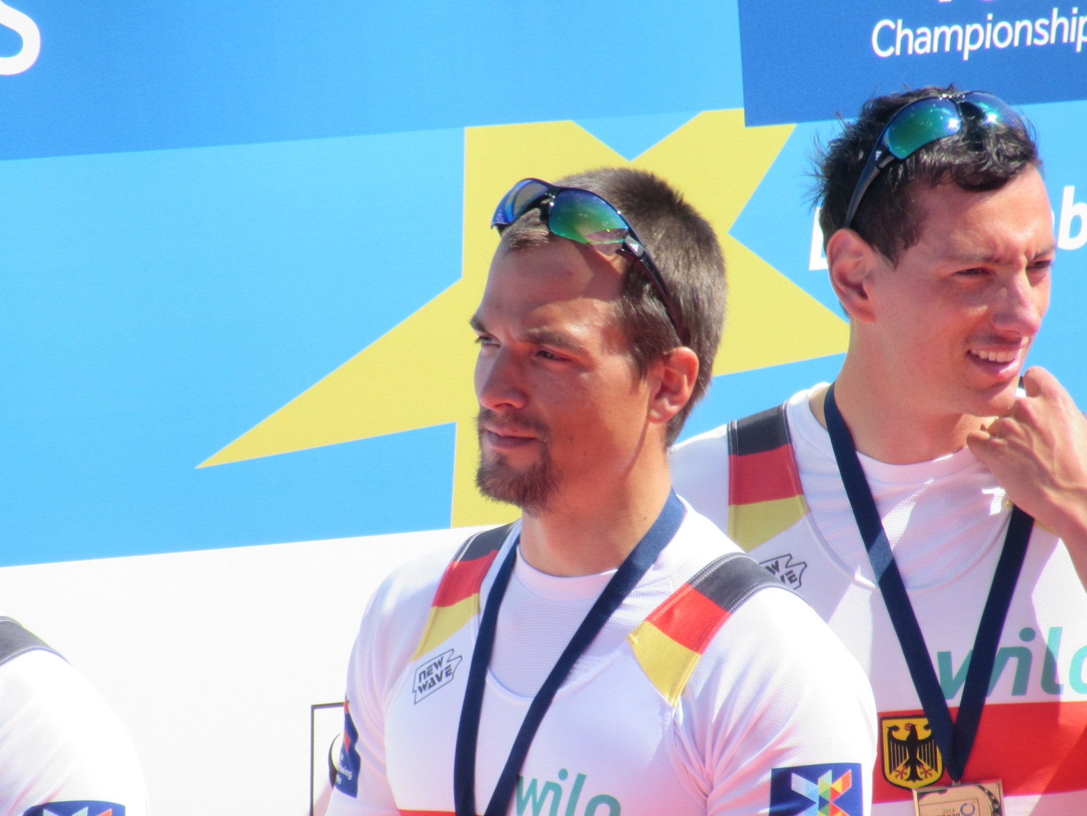 Maximilian Reinelt, Ruder-EM 2016